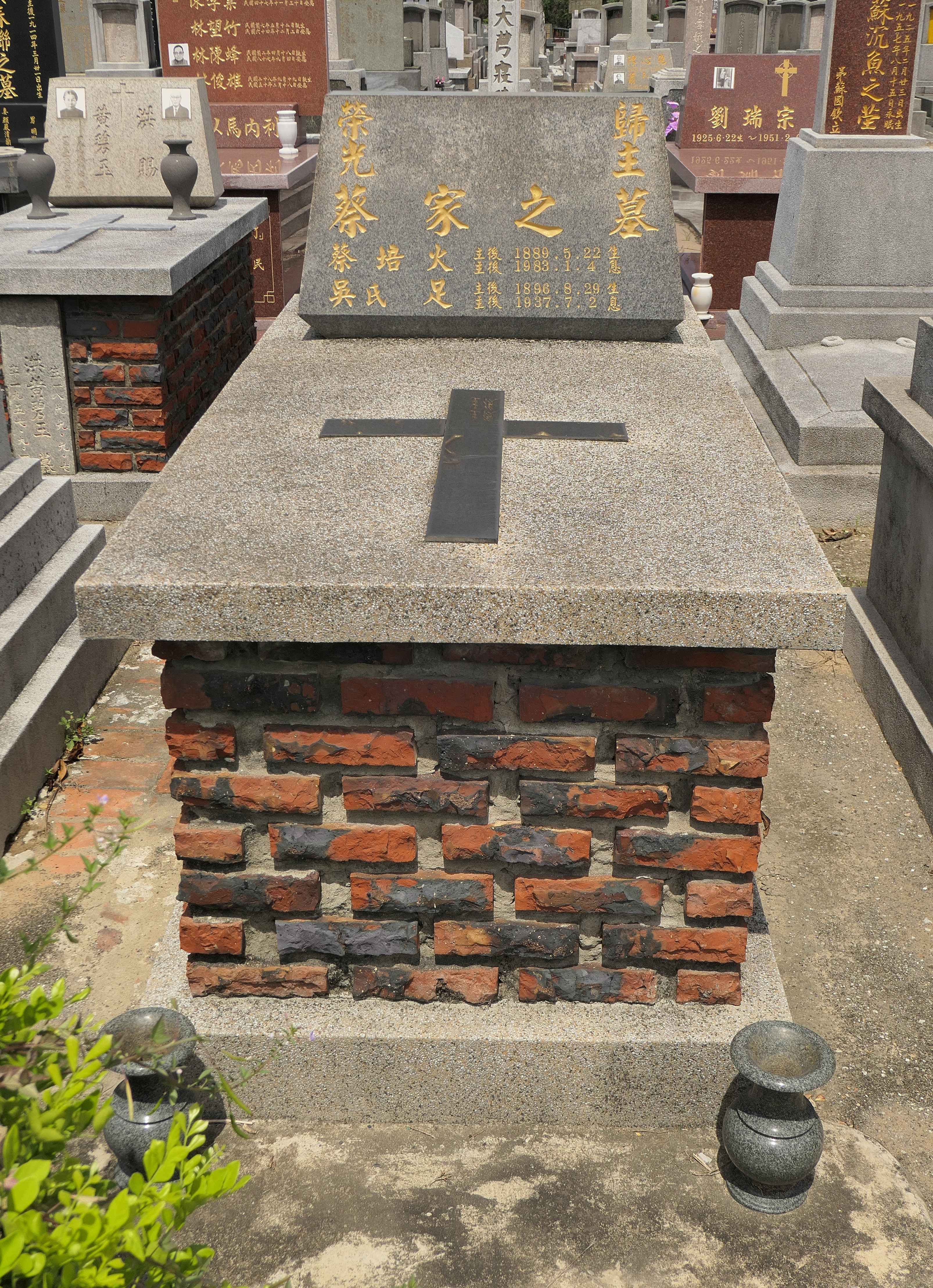 蔡培火墓，位於臺南南山公墓。